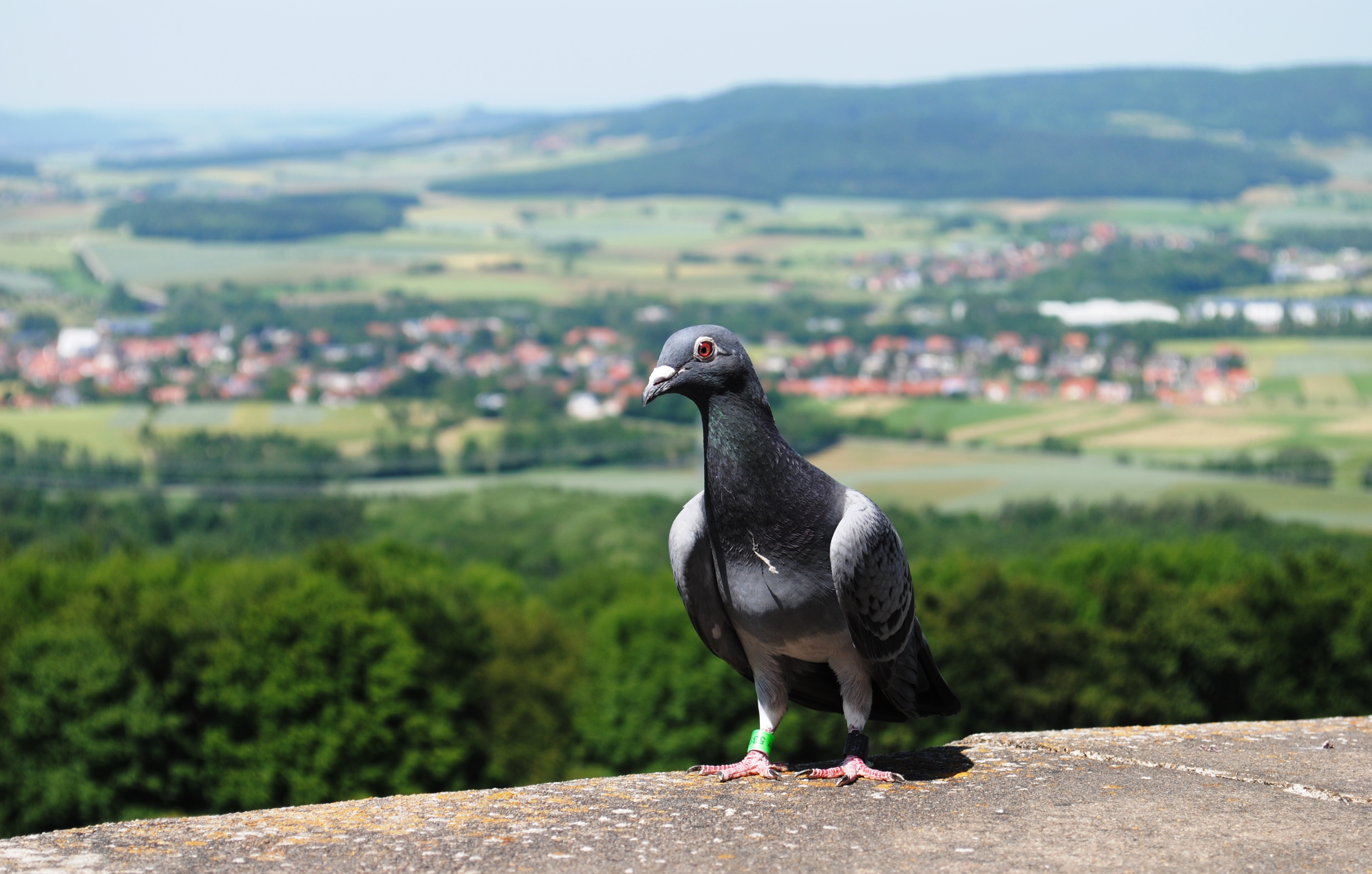 Brieftaube auf der Giechburg, Scheßlitz